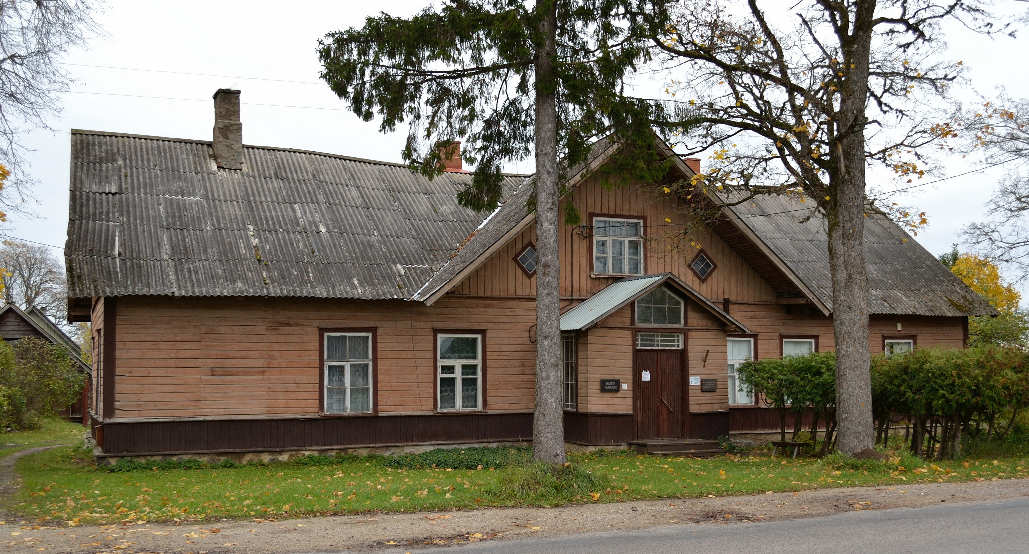 Hageri apteegi hoone